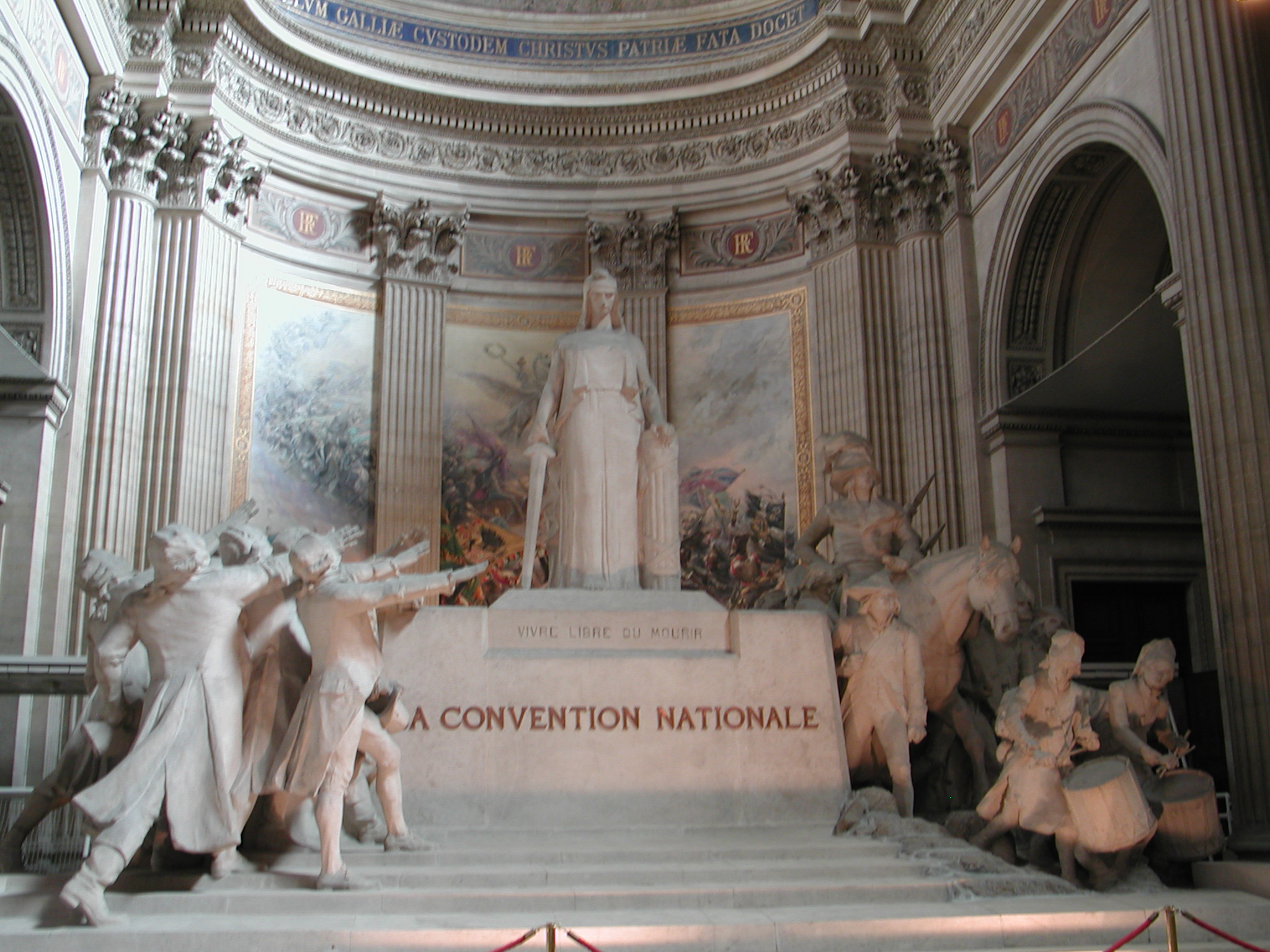 Autel de la Convention nationale. Sculpture de Sicard, placée au Panthéon de Paris en 1913.